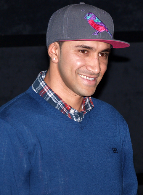 Amir Issaa - Foto di G. M. Ireneo Alessi (Sinix)